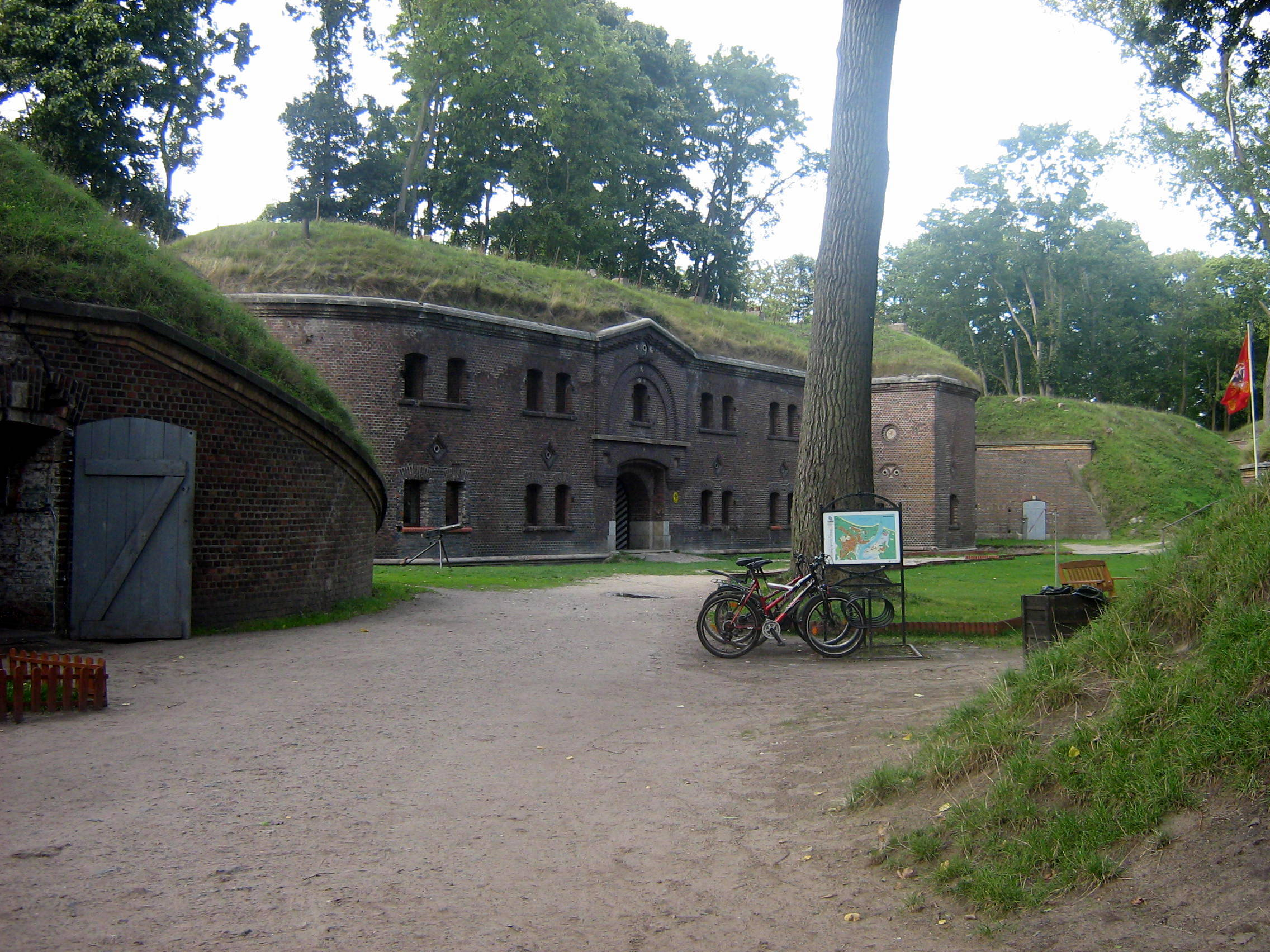 Fort Gerharda - widok na muzeum